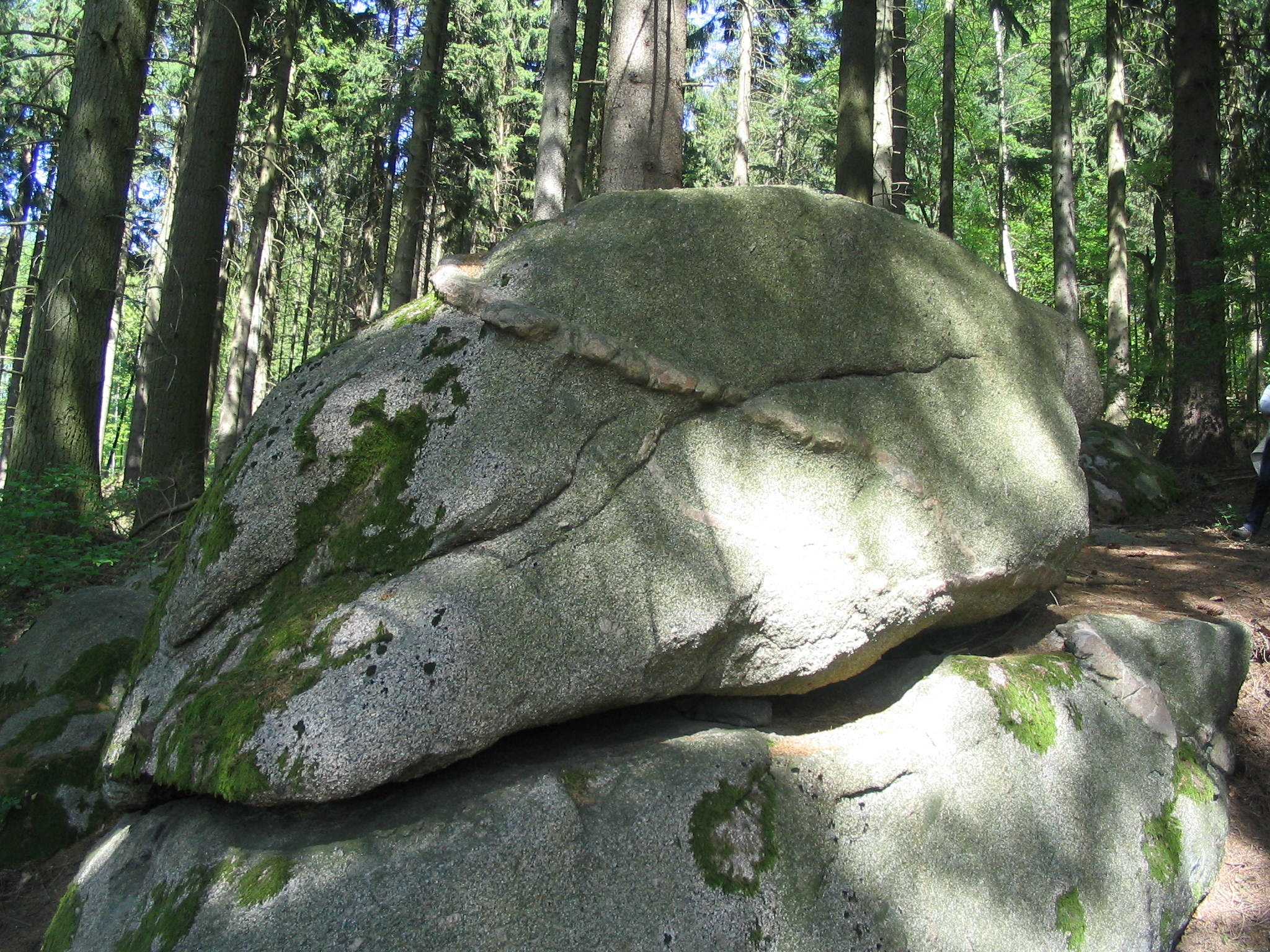 Teufelstein im Granit-Granodiorit-Diorit-Mischgebiet des Waldkopfs (südlich Löhrbachs, Odenwald)